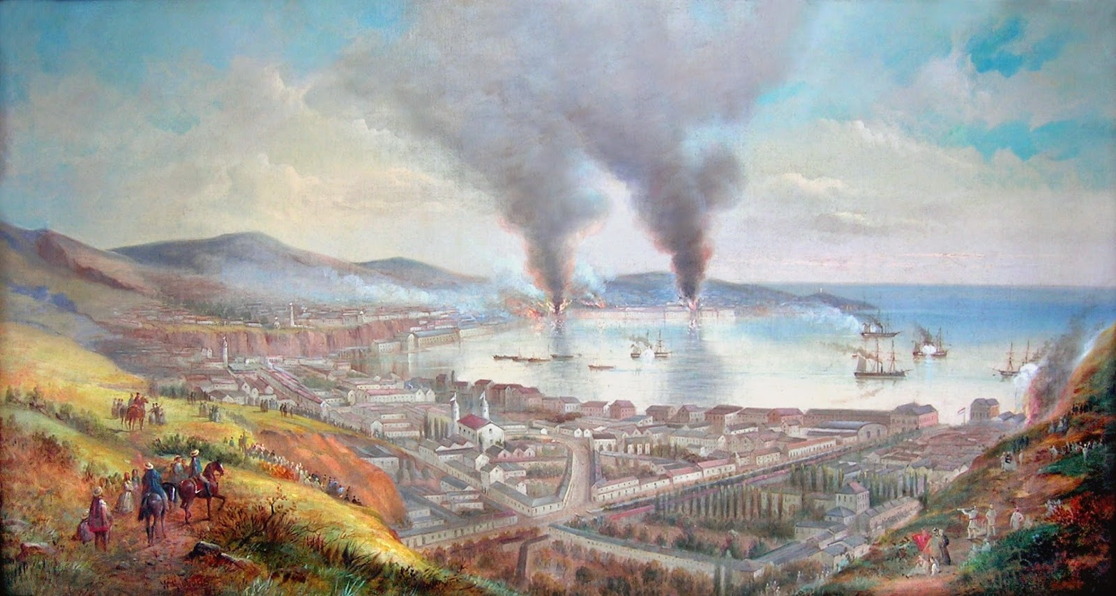 William Gibbons "Valparaíso Chile during the bombardment by the admiral Méndez Núñez". Óleo sobre tela Ca. 1870 97x51 cm.